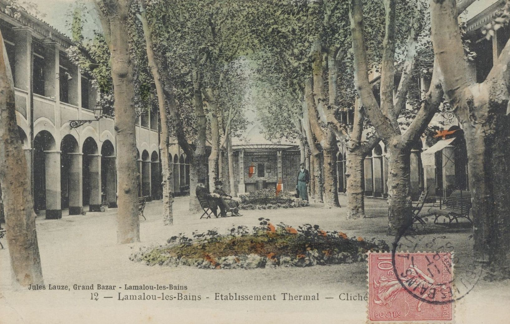 Lamalou-les-Bains. - Etablissement thermal : carte postale.